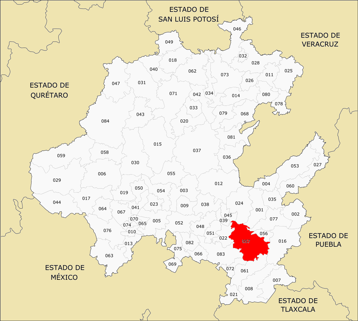 Municipio de Hidalgo